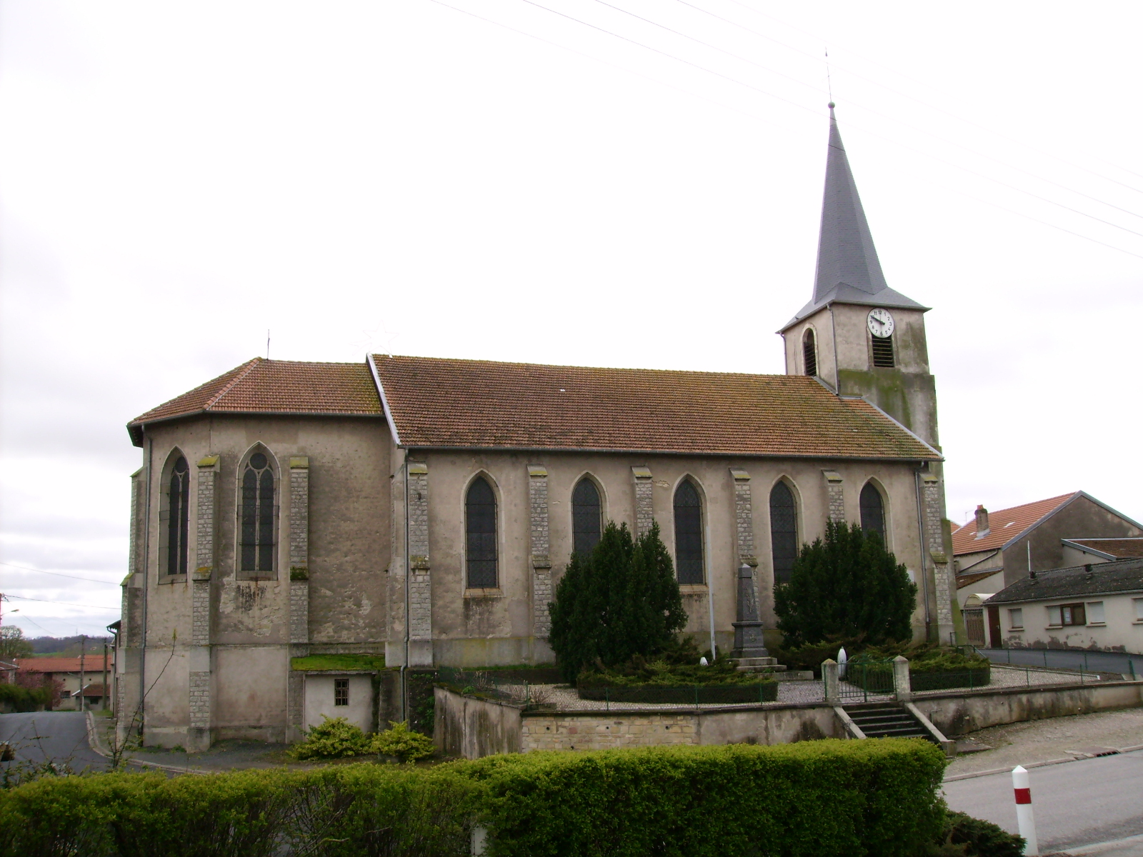 eglise Saint Martin de Maixe